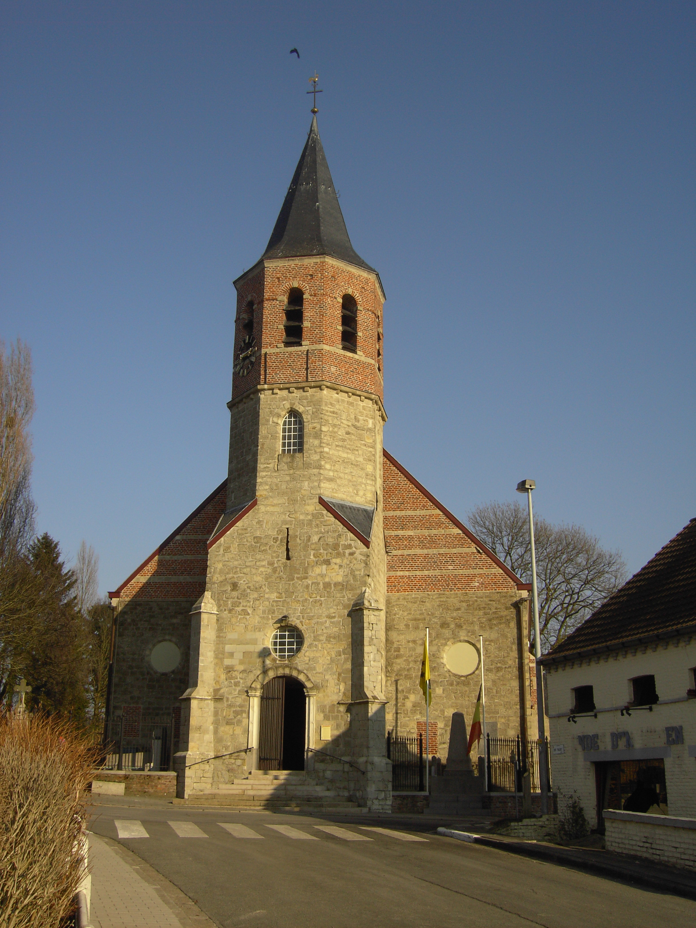 Kerk van Ressegem - Herzele - Oost-Vlaanderen - Vlaanderen - België